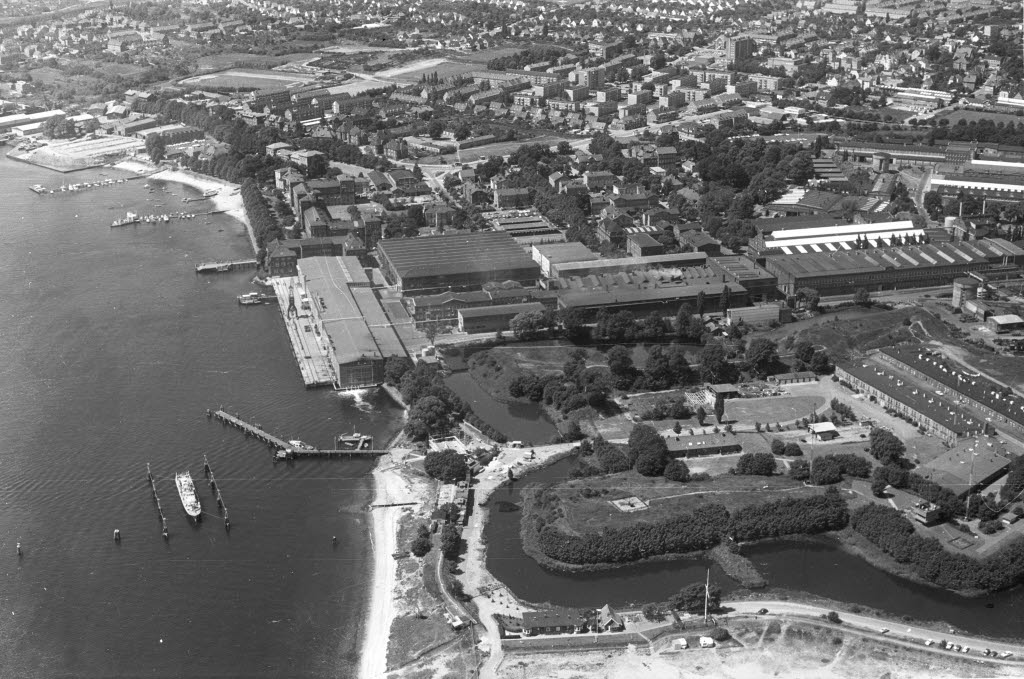 Blick von der Festung Friedrichsort über Maschinenbau Kiel AG (MaK) und Kaserne Friedrichsort zum Christianspries und zur Schanze.